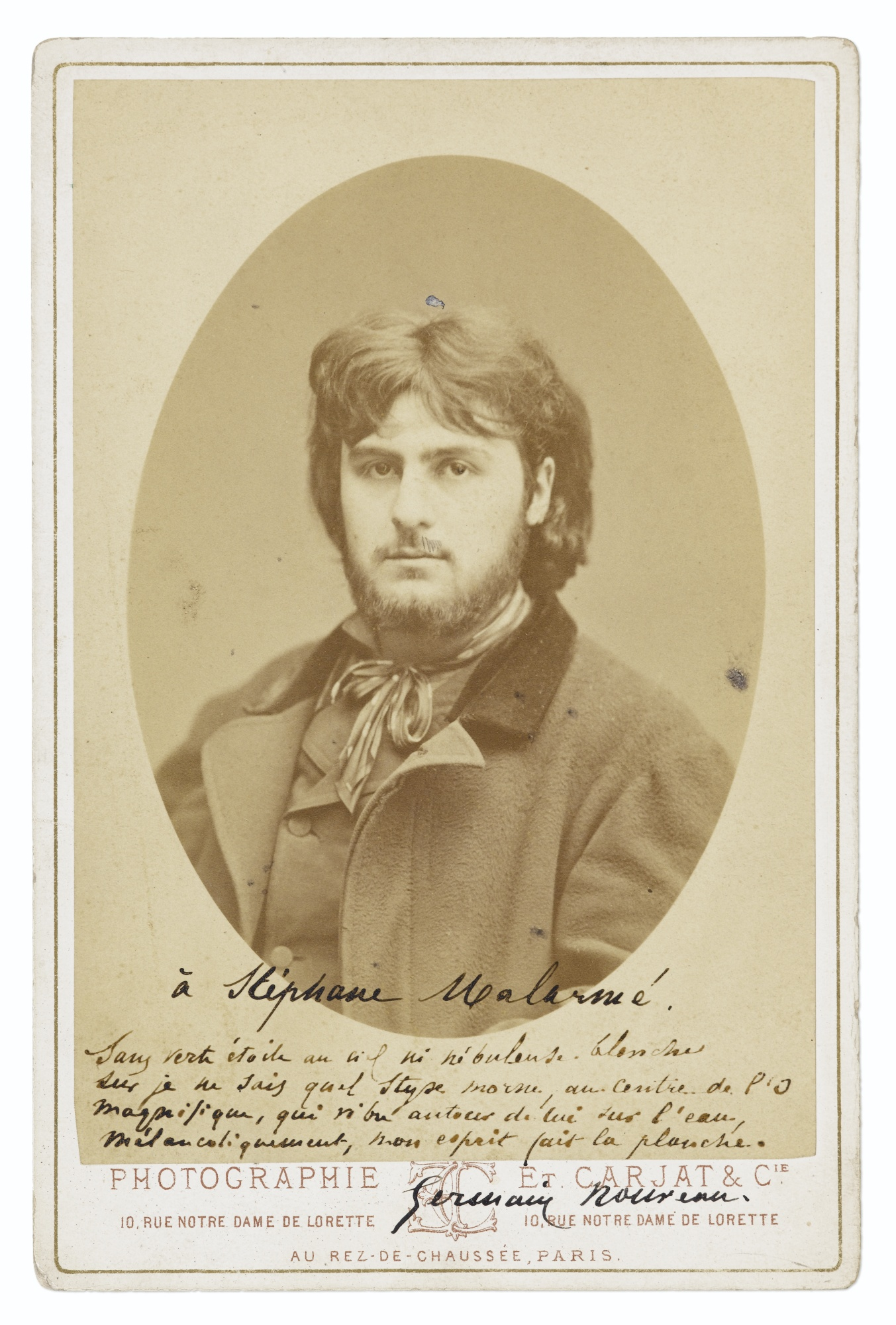 Photo de Germain Nouveau avec dédicace à Stéphane Mallarmé, format cabinet 14,3 x 9,8 cm, origine Bibliothèque Malarmé. Vente Sotheby's, 15 octobre 2015, Paris. n° de lot 211 (47 500 €).